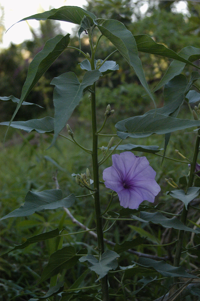 Ipomoea arbórea variedade roxa